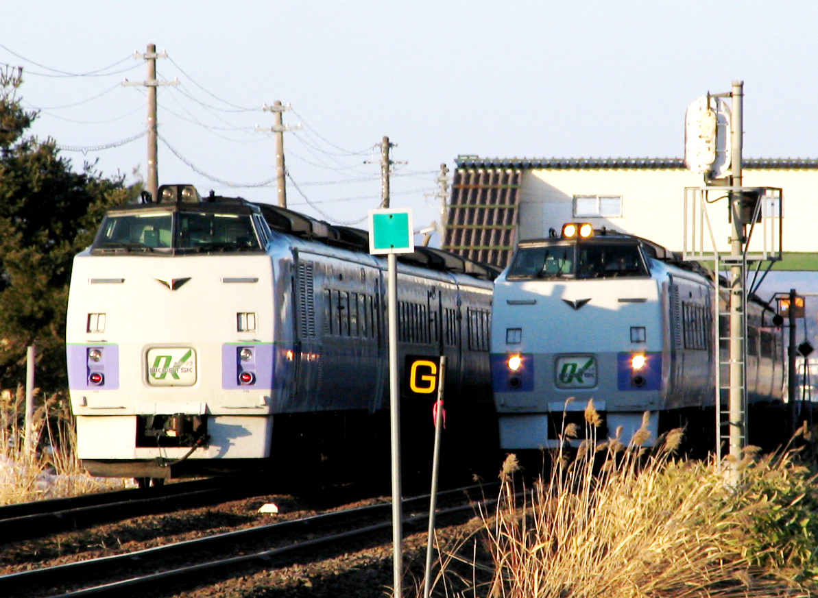 JR石北本線 桜岡駅で交換する特急オホーツク5号と6号 投稿者撮影(2008.3.30)